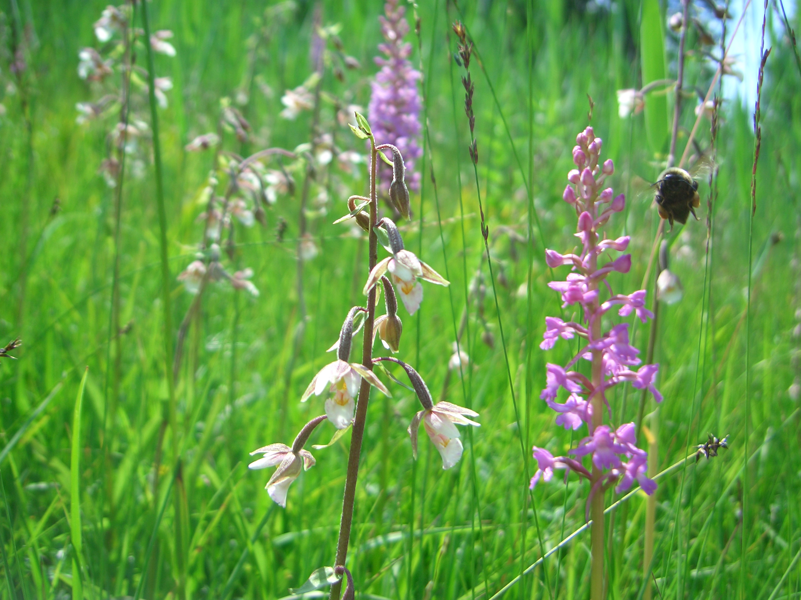 Streuwiese am Fuß des Heubergs, „Samerberger Streuwiesen und Quellmoore“, Gemeinde Samerberg, Landkreis Rosenheim